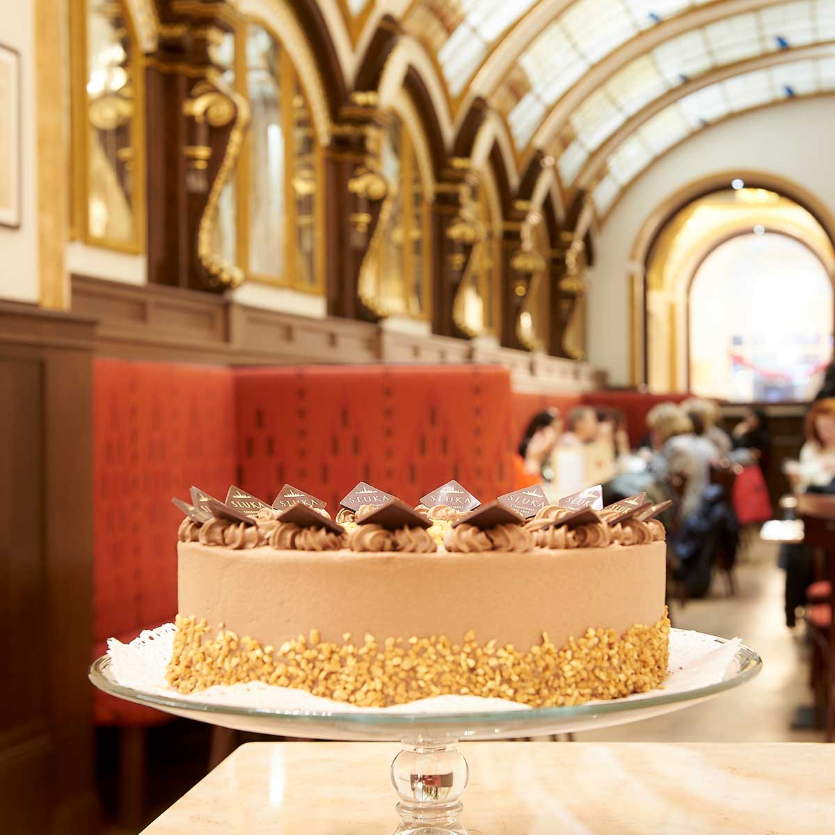 traditionelle Sluka Torte